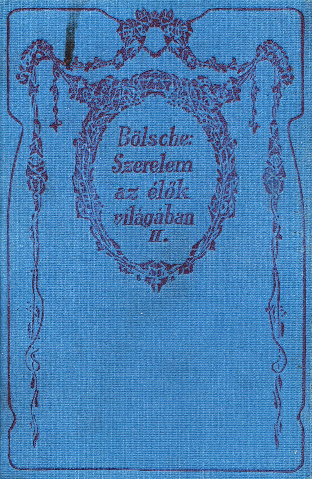 Athenaeum könyvtár - könyvsorozatának könyvborítója. A könyvborító szerzője nem ismert. 1912. Bölsche: Szerelem az élők világában II. kötet (1912)